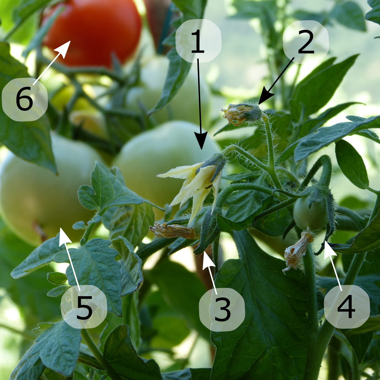 Les indices de 1 à 6 illustrent les étapes du developement d'une tomate : floraison, fructification et maturation.